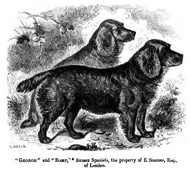 Sussex Spaniel